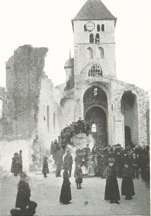 Démolition du prieuré de Bourg-de-Thizy en 1898